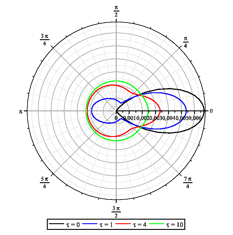 Propagation dans un milieu unidimensionnel avec diffusion seule